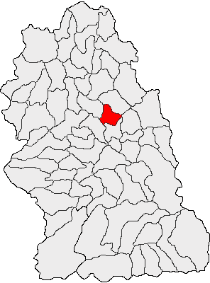 Categorie:Hărţi ale judeţului Hunedoara